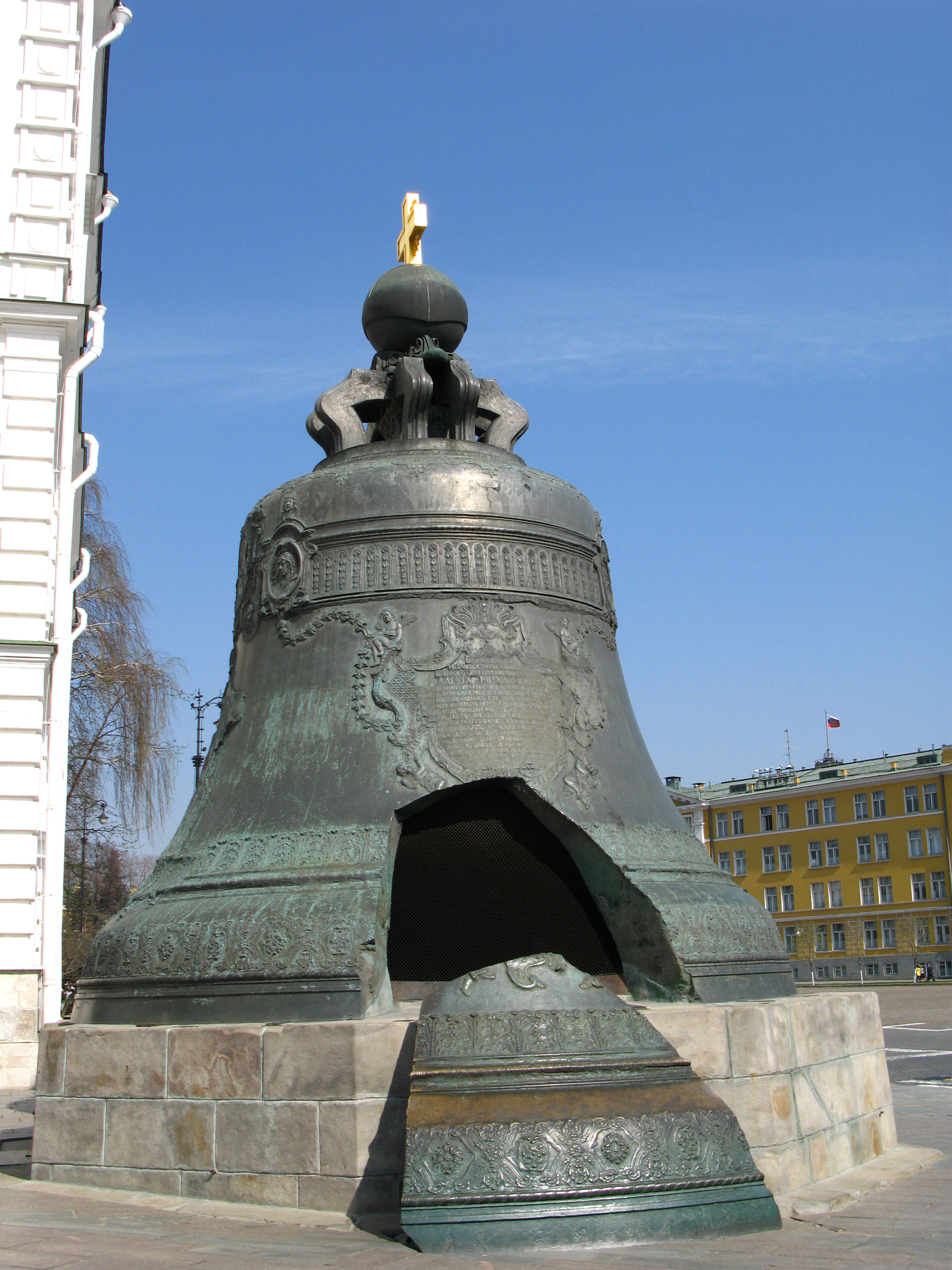 Car-zvono. Kremelj, Moskva.